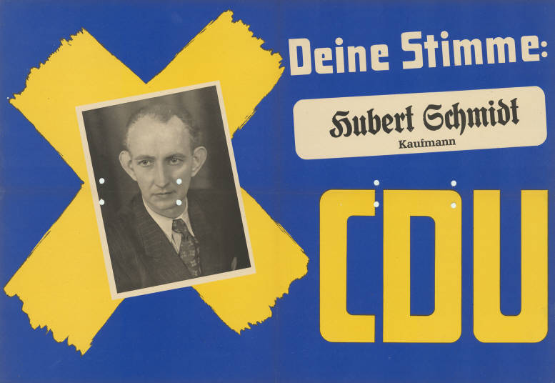 Deine Stimme: Hubert Schmidt Kaufmann CDU Abbildung: Porträtfoto - Stimmkreuz Plakatart: Kandidaten-/Personenplakat mit Porträt Objekt-Signatur: 10-009 : 179 Bestand: Landtagswahlplakate Nordrhein-Westfalen (10-009) GliederungBestand10-18: Landtagswahlplakate Nordrhein-Westfalen (10-009) » Landtagswahl am 18.6.1950 » CDU » mit Porträtfoto Lizenz: KAS/ACDP 10-009 : 179 CC-BY-SA 3.0 DE